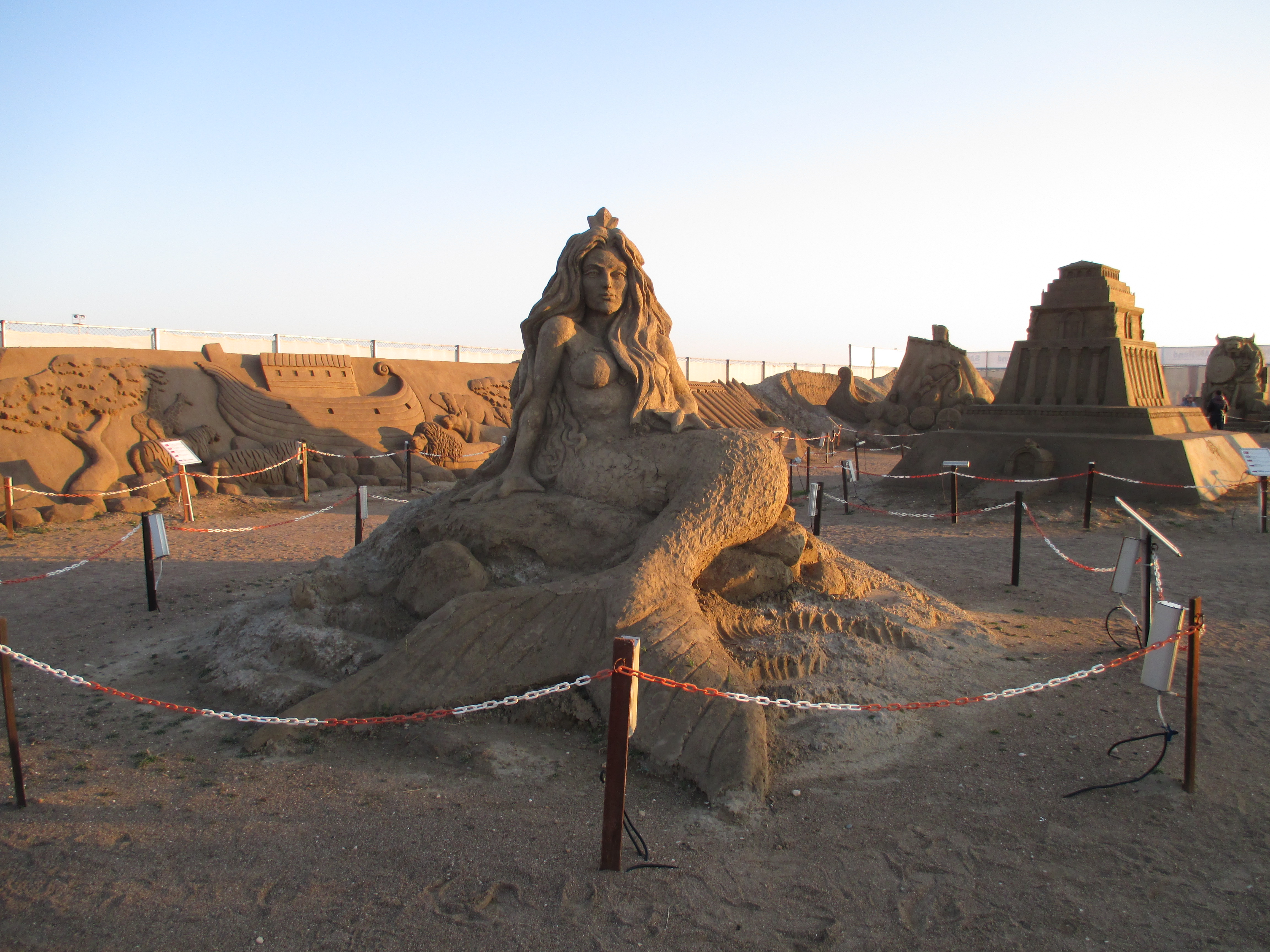 Das Sandskulpturenfestival in Lara widmet sich stets einem neuen Thema mit internationalen Künstlern.